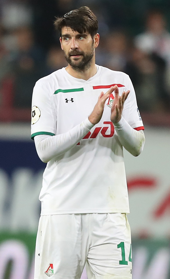 В московском дерби «Локомотива» и «Динамо» - ничья